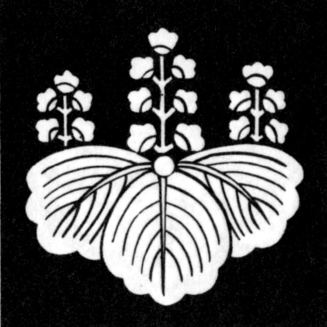 五七桐「対馬桐」、 宗氏